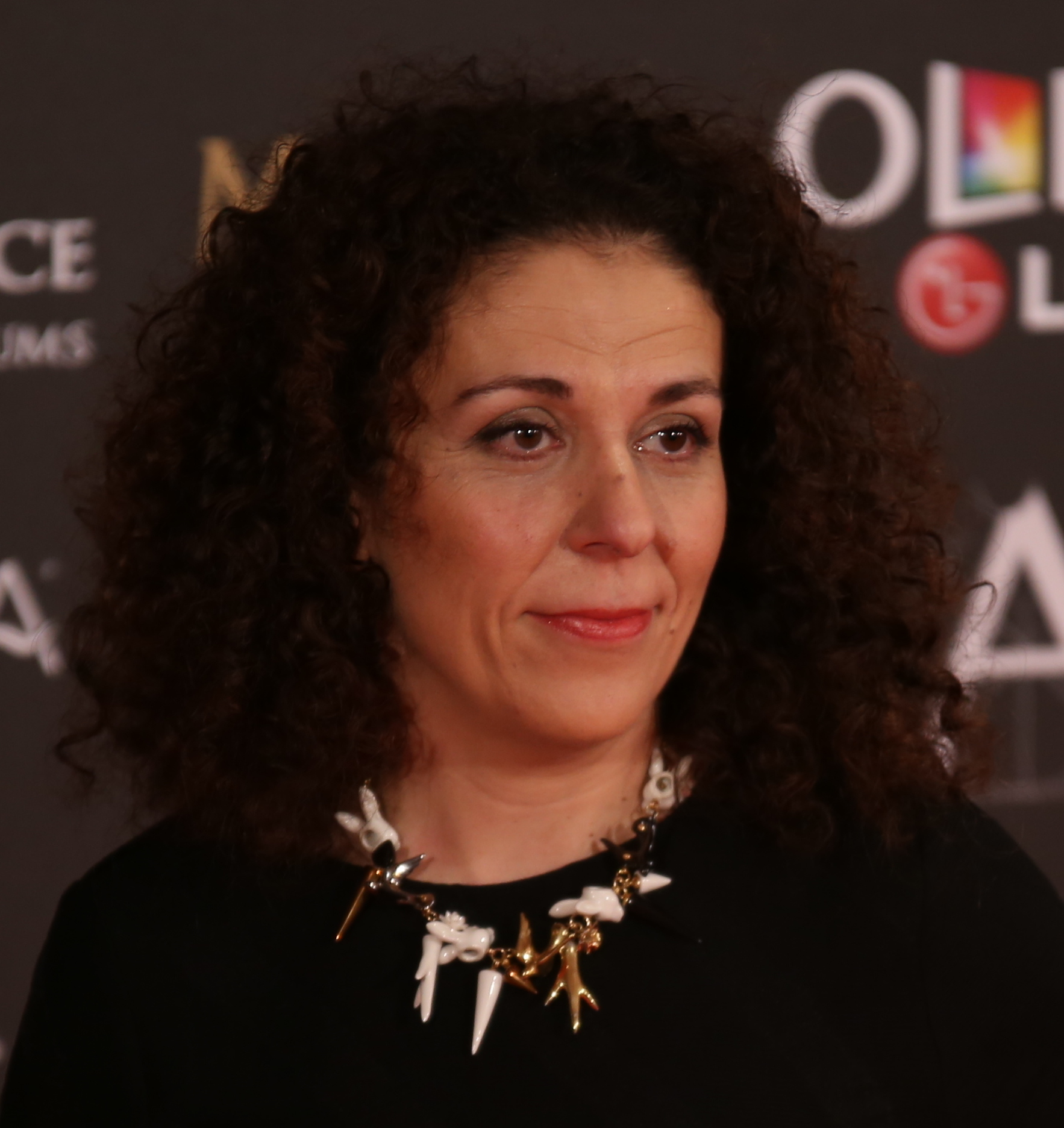 Premios Goya 2017